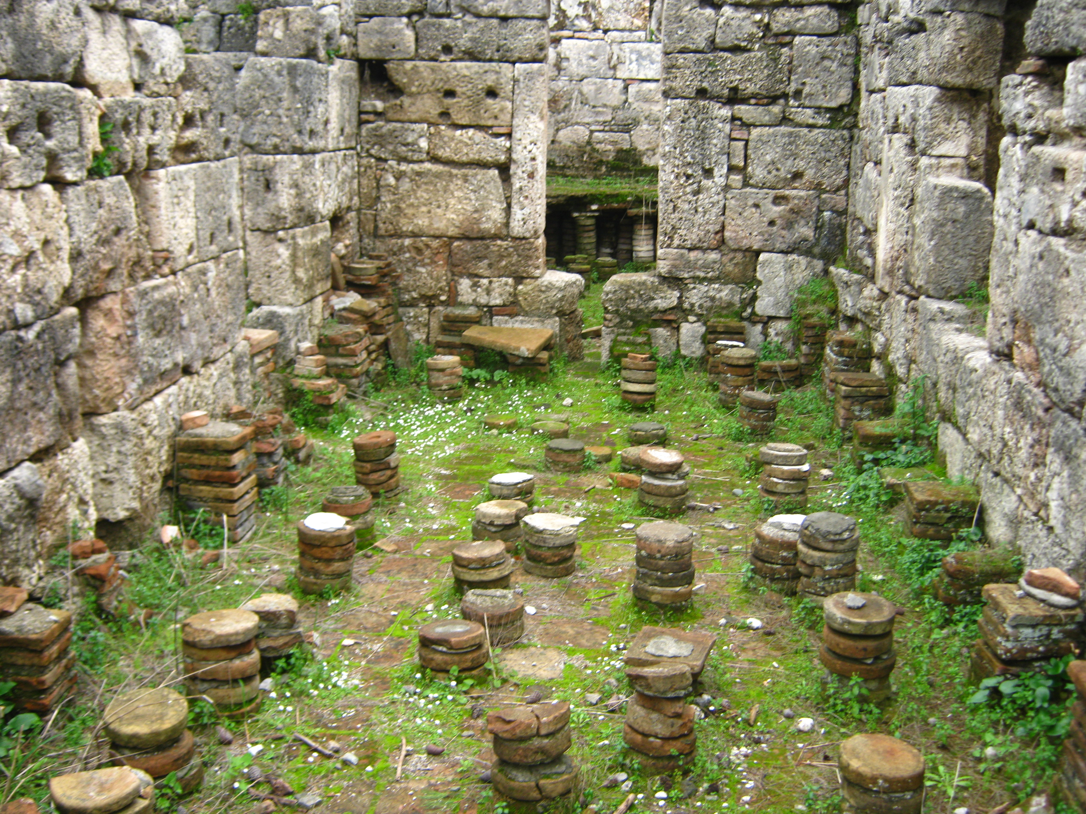 Фаселіс. Система гіпокаусту в кальдарії "Малої терми"